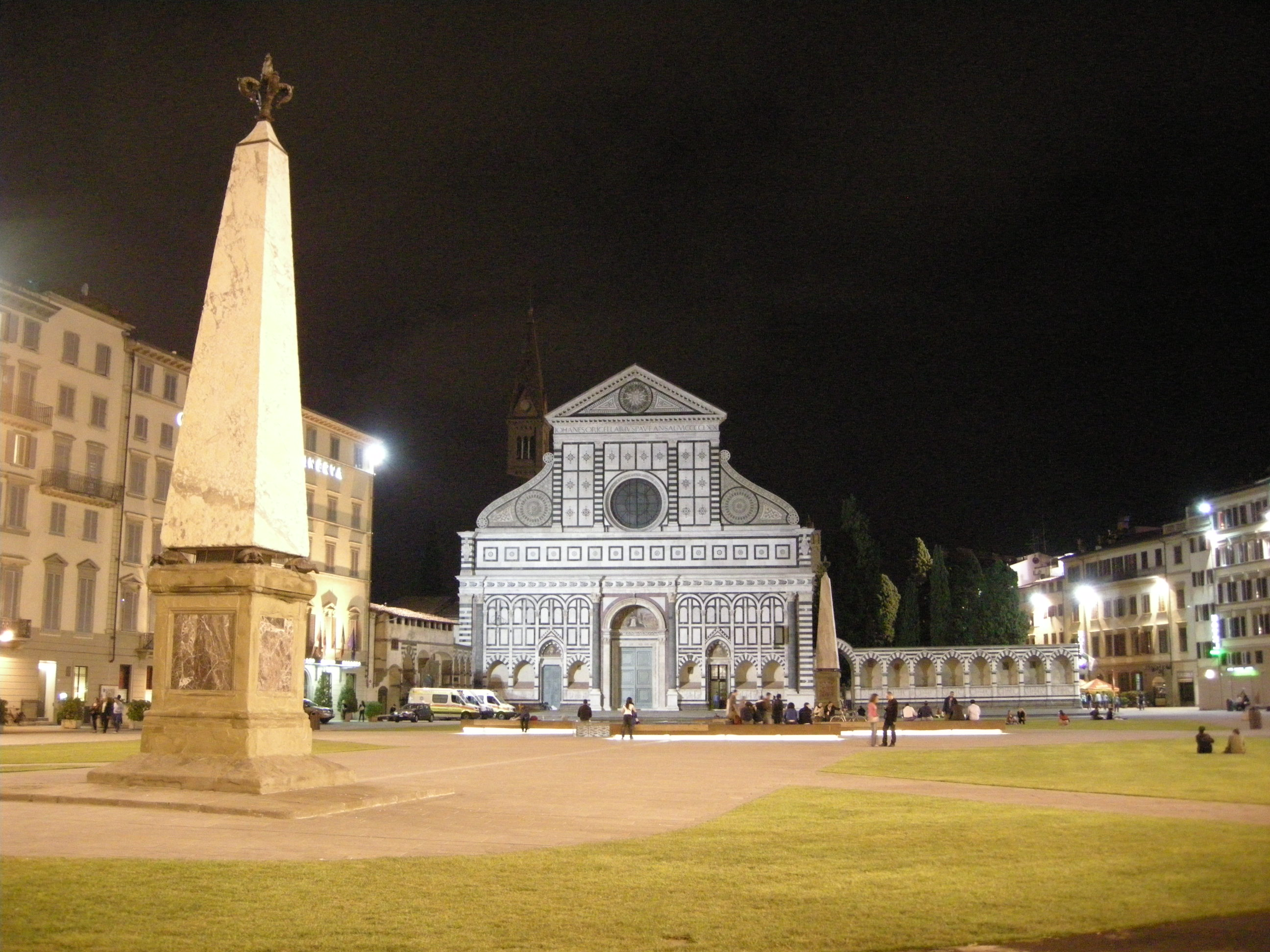 Santa maria novella by night